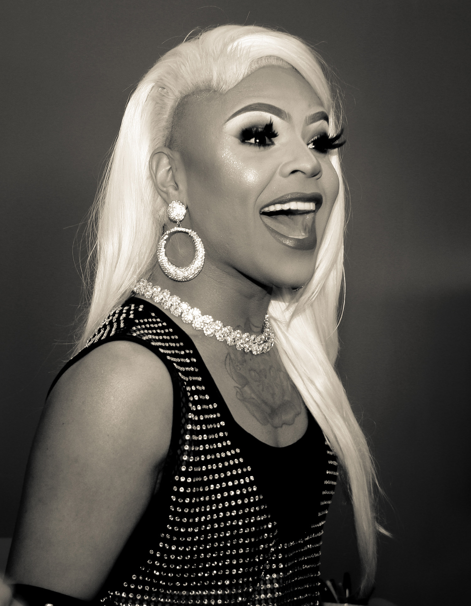 Rupaul's DragCon 2019